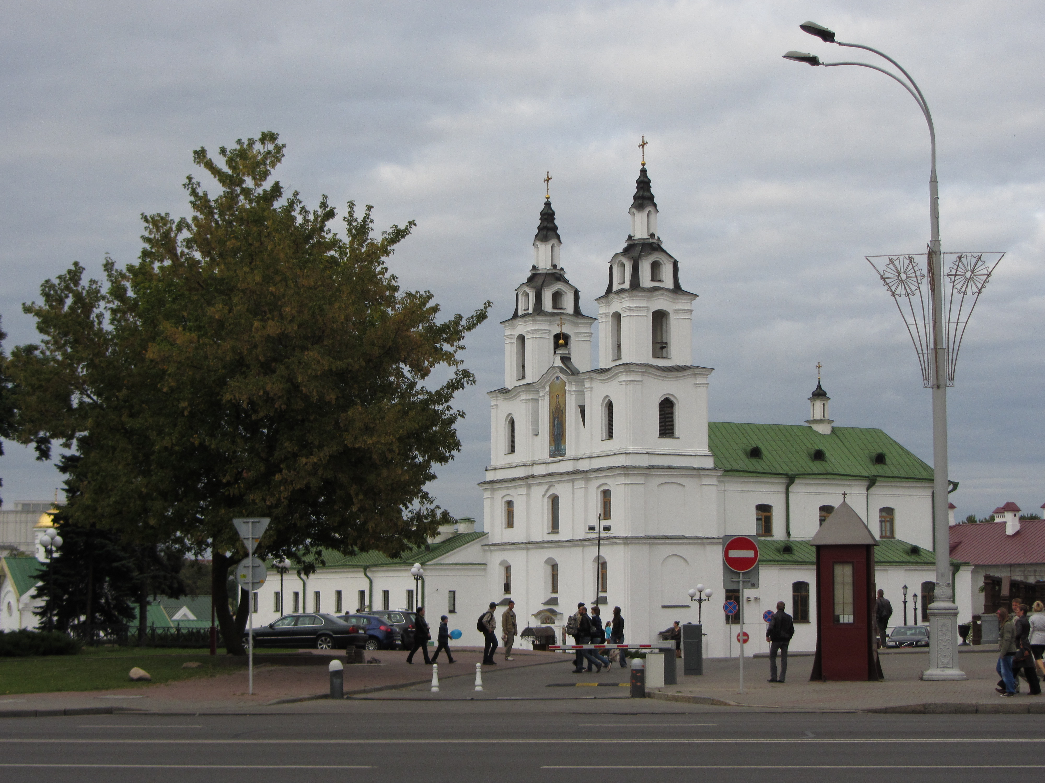 Беларуская (тарашкевіца): Гістарычны цэнтар г. Менску: будынкі і збудаваньні, пляніровачная структура, ляндшафт і культурны пласт. г. Менск This is a photo of Belarusian heritage monument. Reference number: 711Е000001 ( WLM)